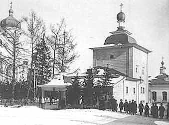 г. Иркутск. Вознесенский монастырь